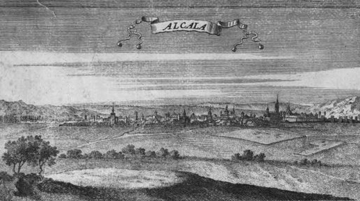 Vista panorámica de Alcalá de Henares (Comunidad de Madrid - España) en 1687, según dibujo grabado al aguafuerte de Juan Francisco Leonardo. Corresponde a un detalle del Mapa del Arzobispado de Toledo, impreso por iniciativa del arzobispo Luis Manuel Fernández de Portocarrero.